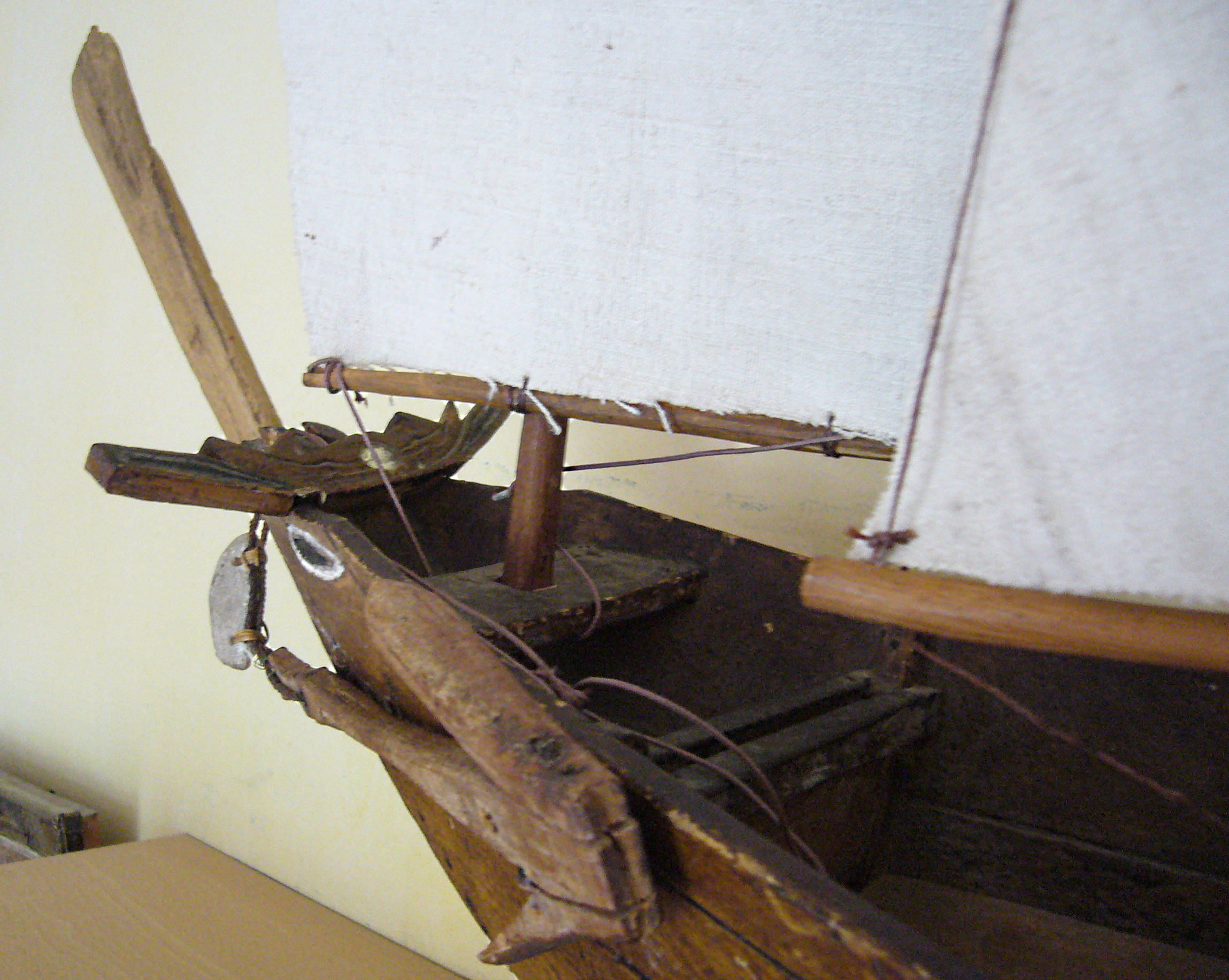 Maquette de bateau de la région de Tourane (actuellement Da Nang), Annam, ancienne Indochine, Viêt Nam. 1ère moitié du XXe siècle.